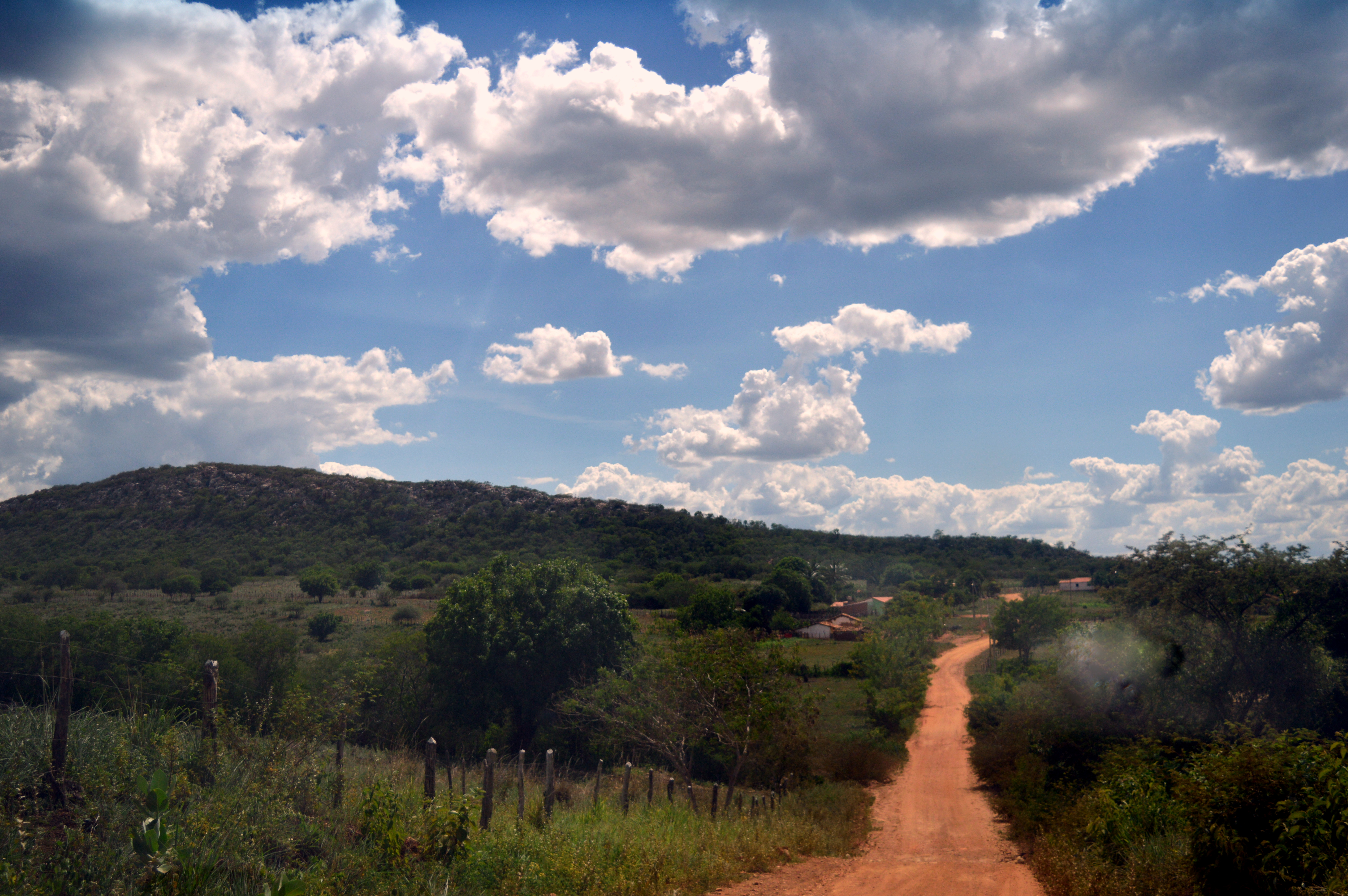 Estrada dentro do distrito de Águas do Paulista em Paratinga. Foto de 18 de janeiro de 2017.